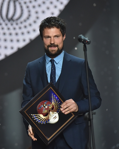 Премия Золотая маска - 2017 года